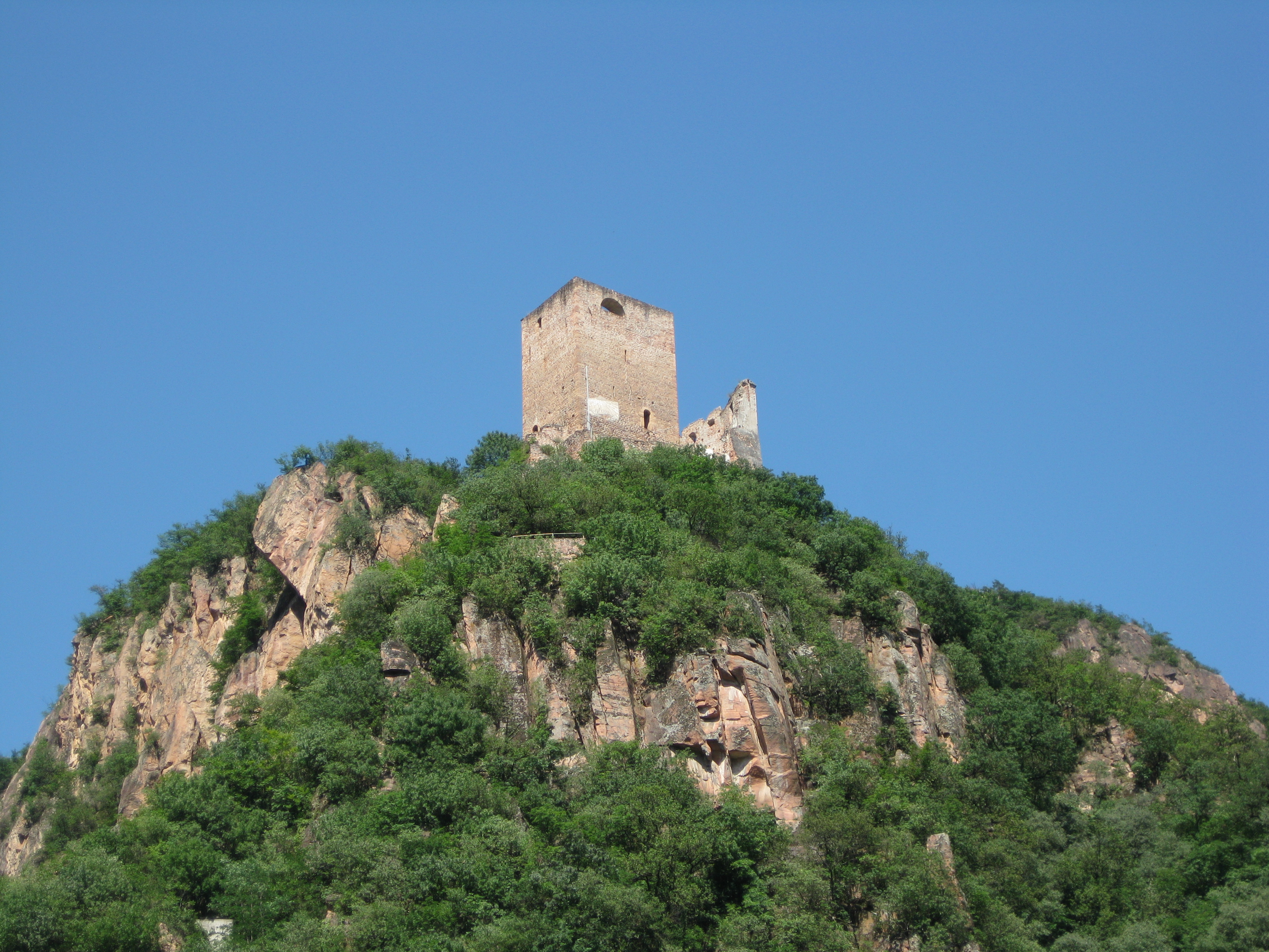 Burg Neuhaus